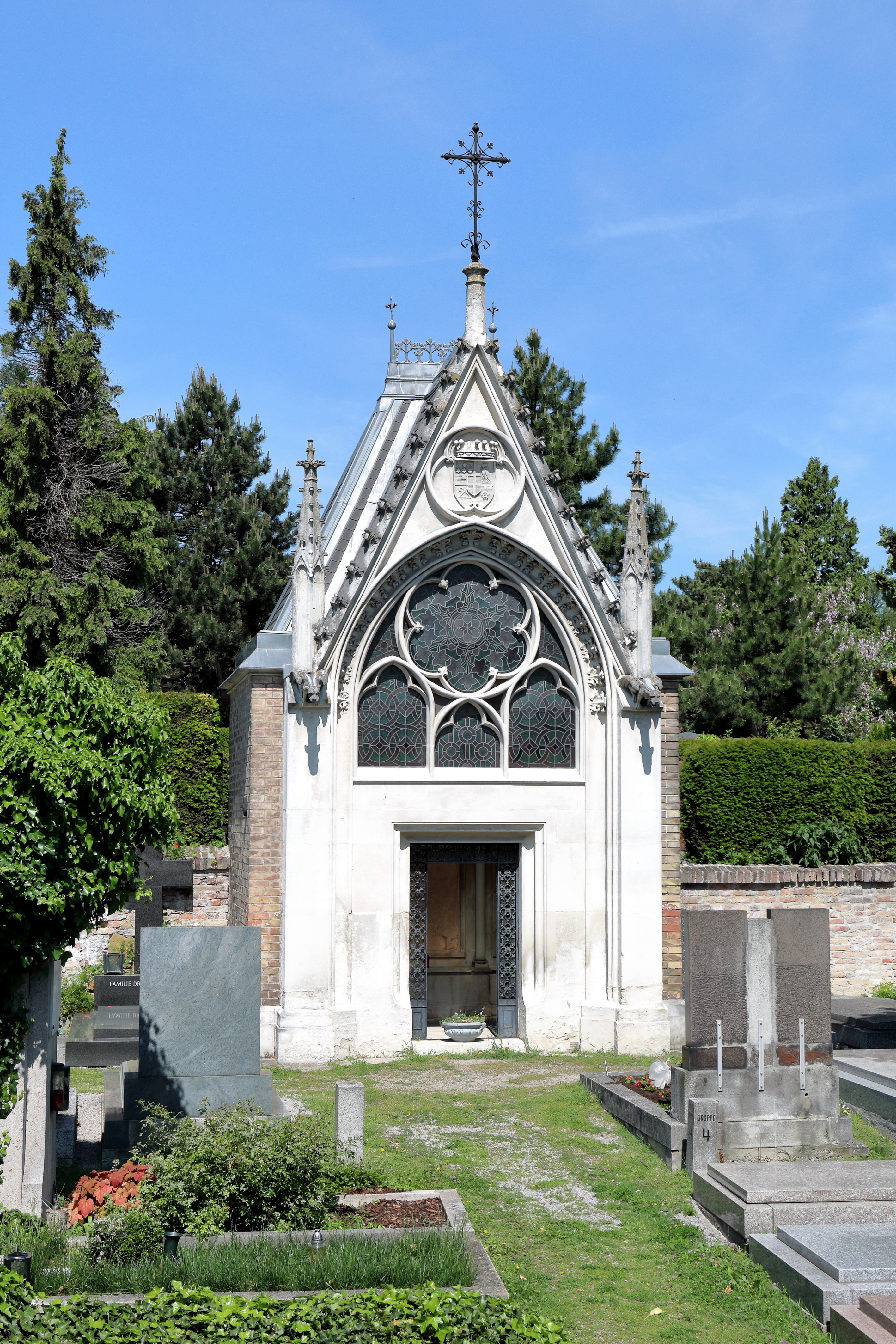 Mausoleum der Familie Ferstel am Grinzinger Friedhof (Gruppe:MA, Nummer 46) im 19. Wiener Gemeindebezirk Döbling. Die neogotische Gruftkapelle wurde nach einer Skizze von Heinrich von Ferstel von seinem Sohn Max von Ferstel entworfen und lt. Architekturlexikon vom Baumeister Heinz Gerl 1891 errichtet.